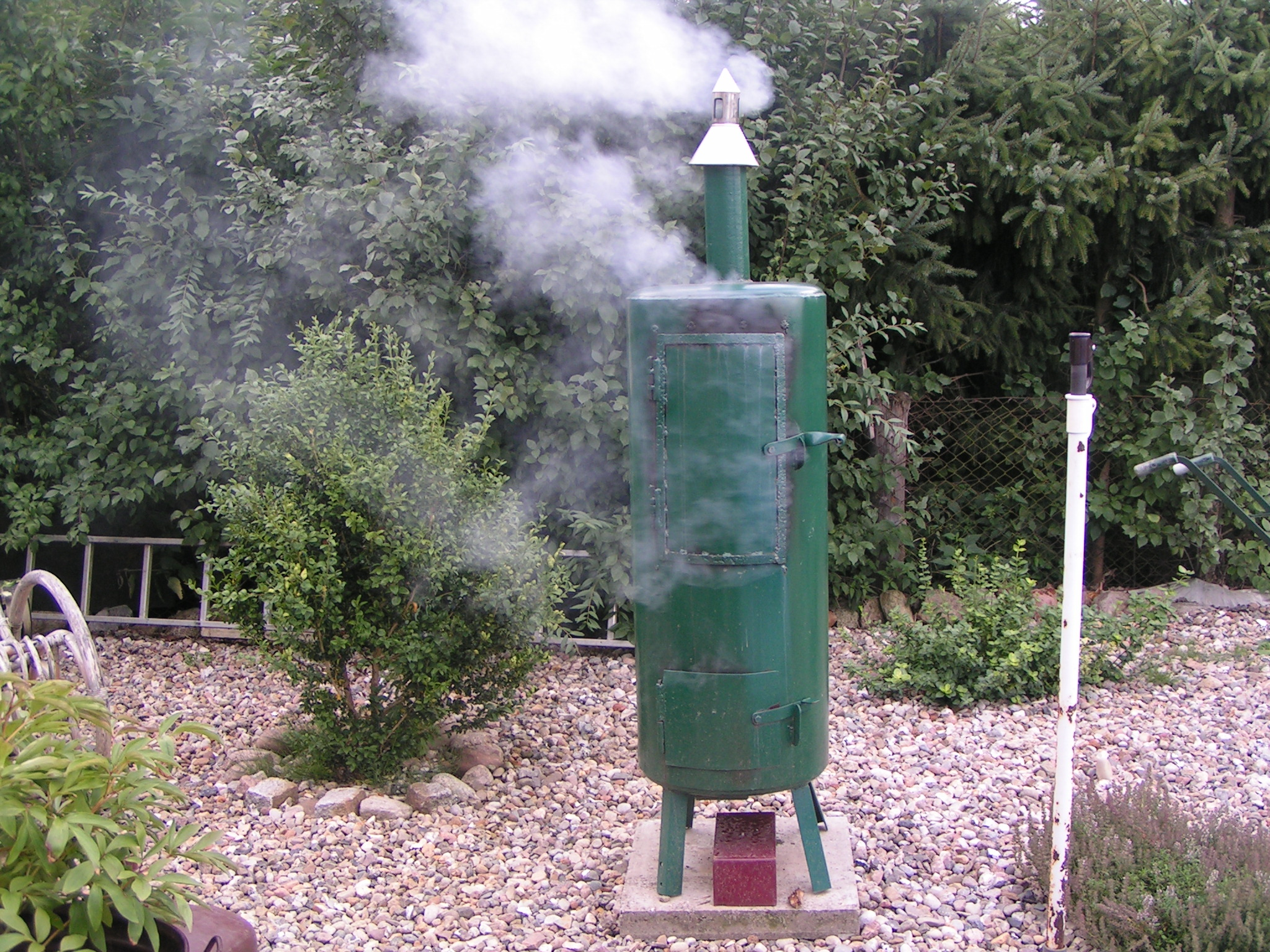 Ein Räucherofen